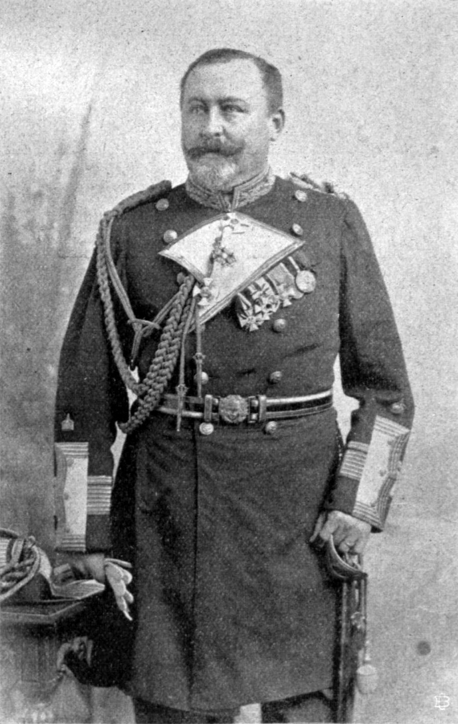 Kontreadmiral a. D. Riedel